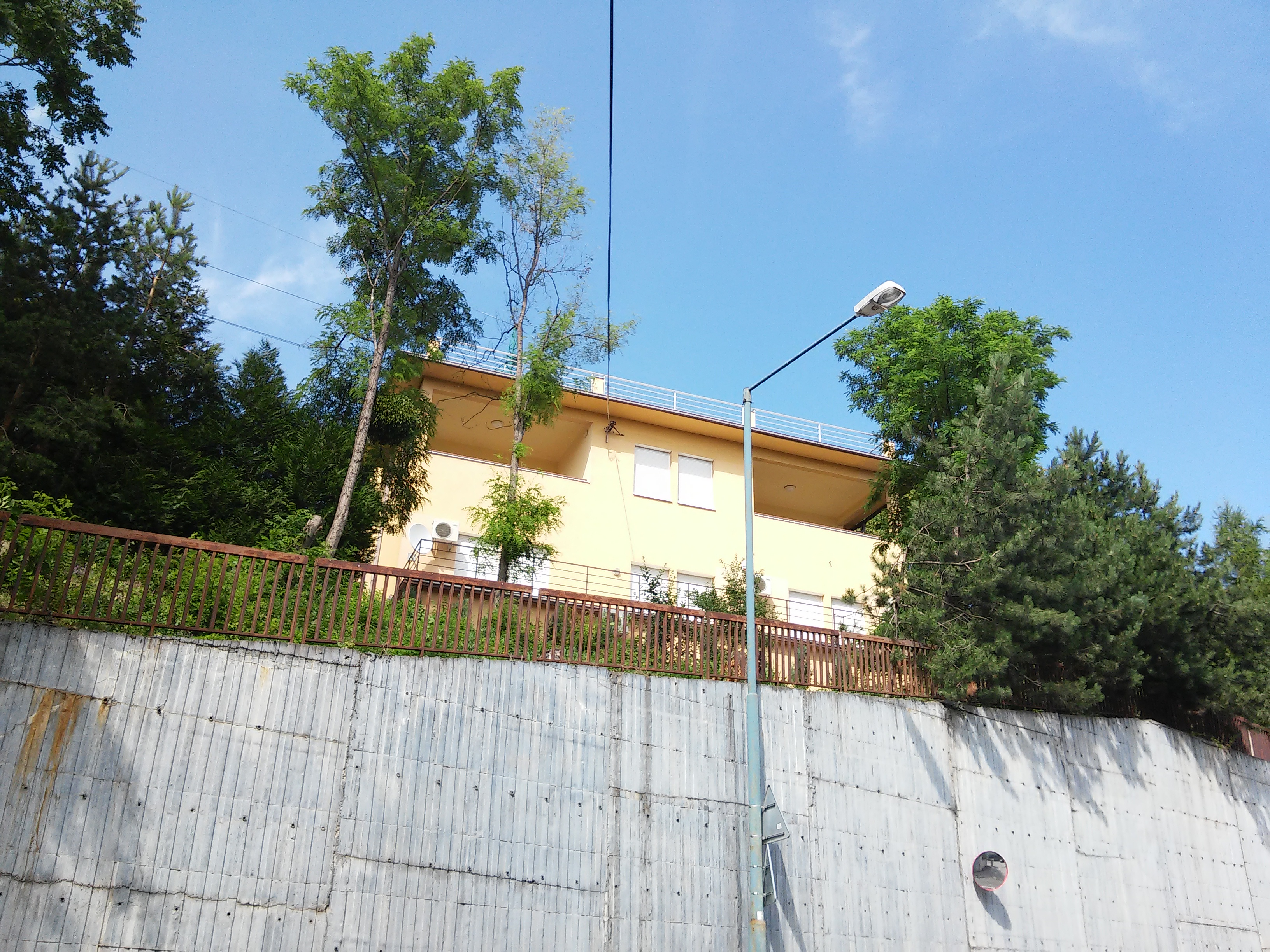 Matejkova, Karlova Ves, Bratislava